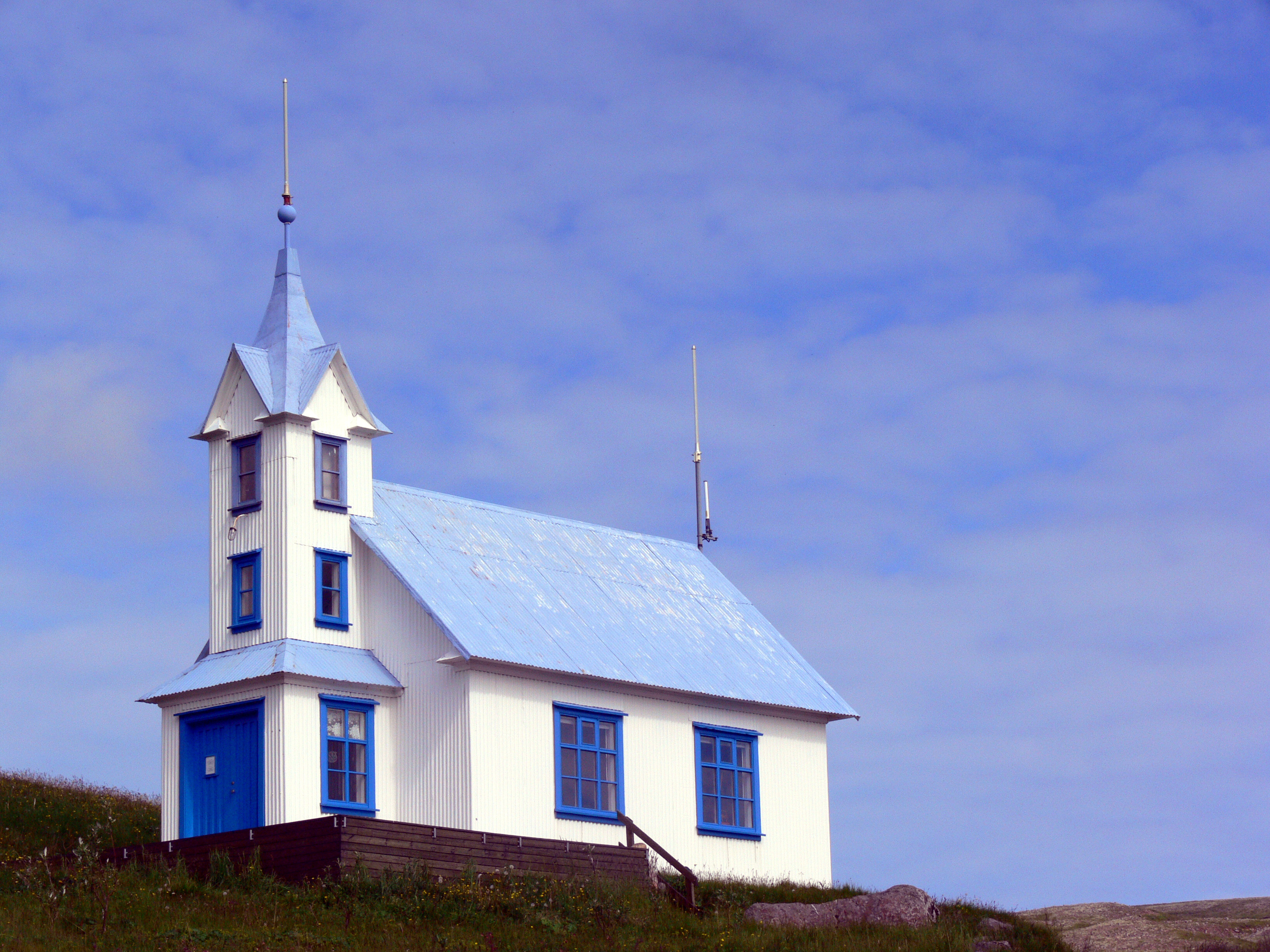 Stöðvarfjörður, Alte Kirche, jetzt Café und Shop.